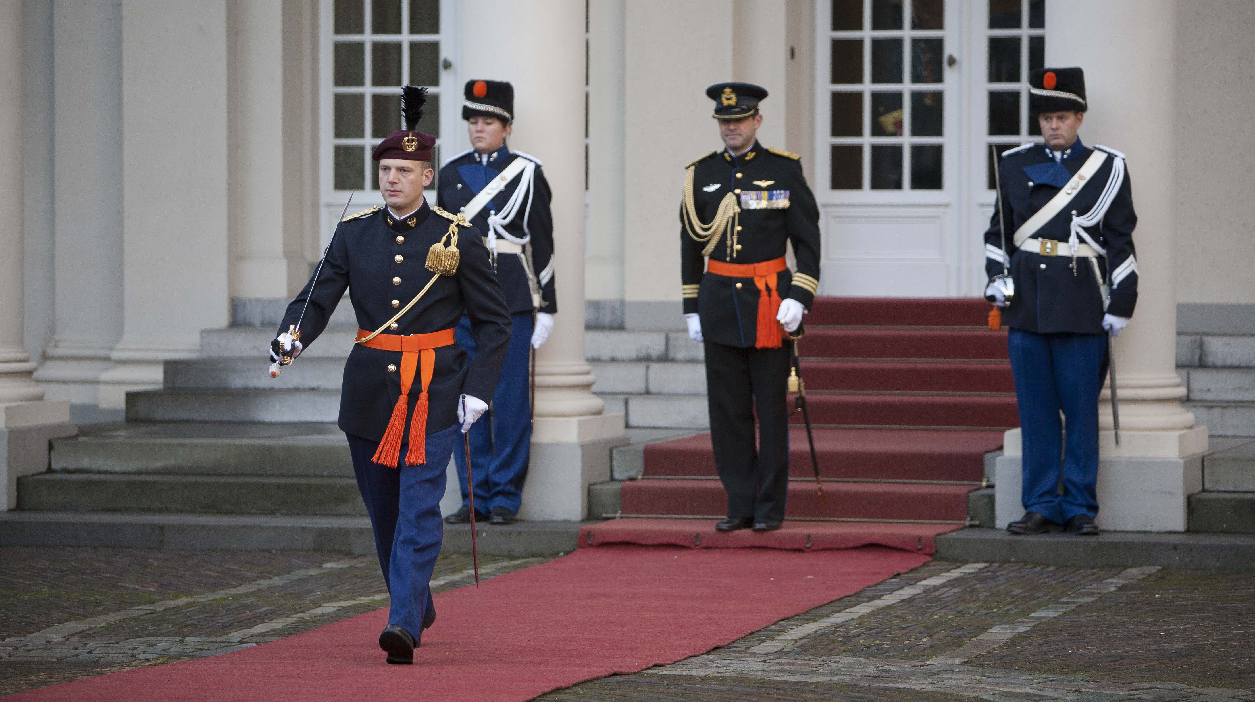 13 Infanteriebataljon Luchtmobiel uit Assen heeft gisteren de erewacht geleverd bij het aanbieden van de geloofsbrieven aan koningin Beatrix door de ambassadeurs van Haïti, Tsjaad en Brunei. Traditiegetrouw gaat dit gepaard met een uitgebreid militair ceremonieel.